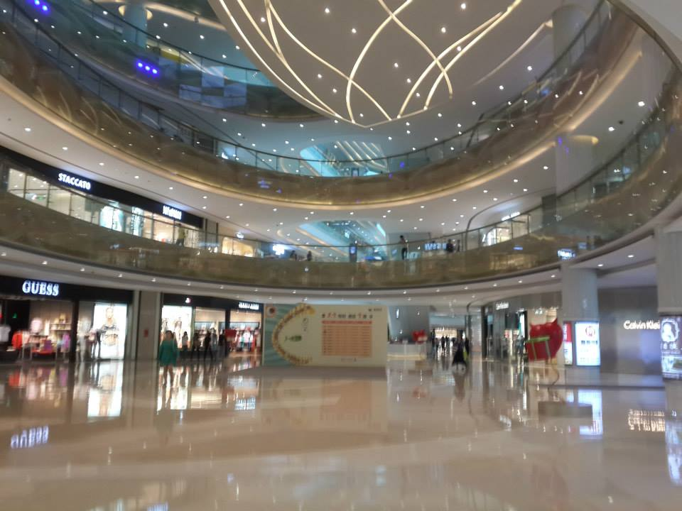 中文（香港）: 深圳龍崗萬科廣場中庭